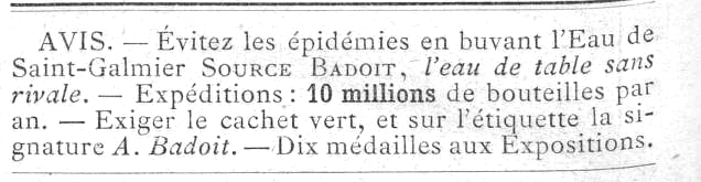 Pub pour les eaux de la Source Badoit.